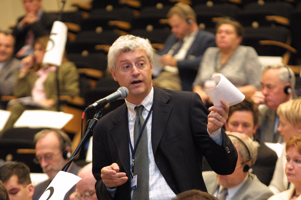 Giovanni Kessler all'Assemblea parlamentare dell'OSCE.